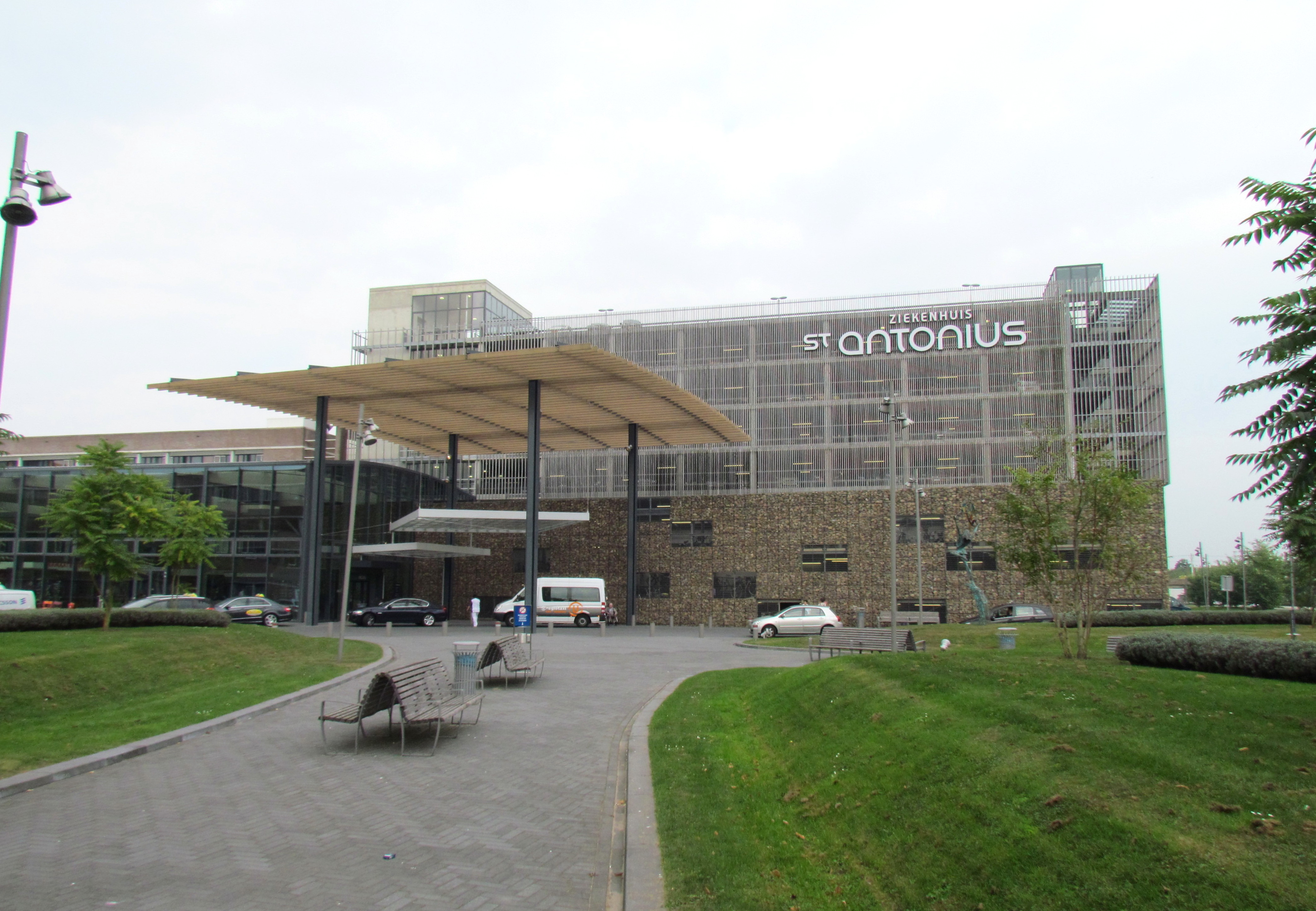 Het St. Antonius Ziekenhuis in Nieuwegein